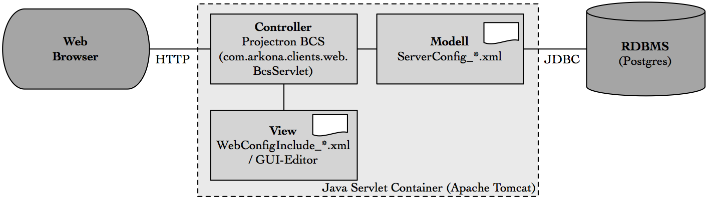 Dieses Bild zeigt die drei schichten Architektur von Projektron BCS.